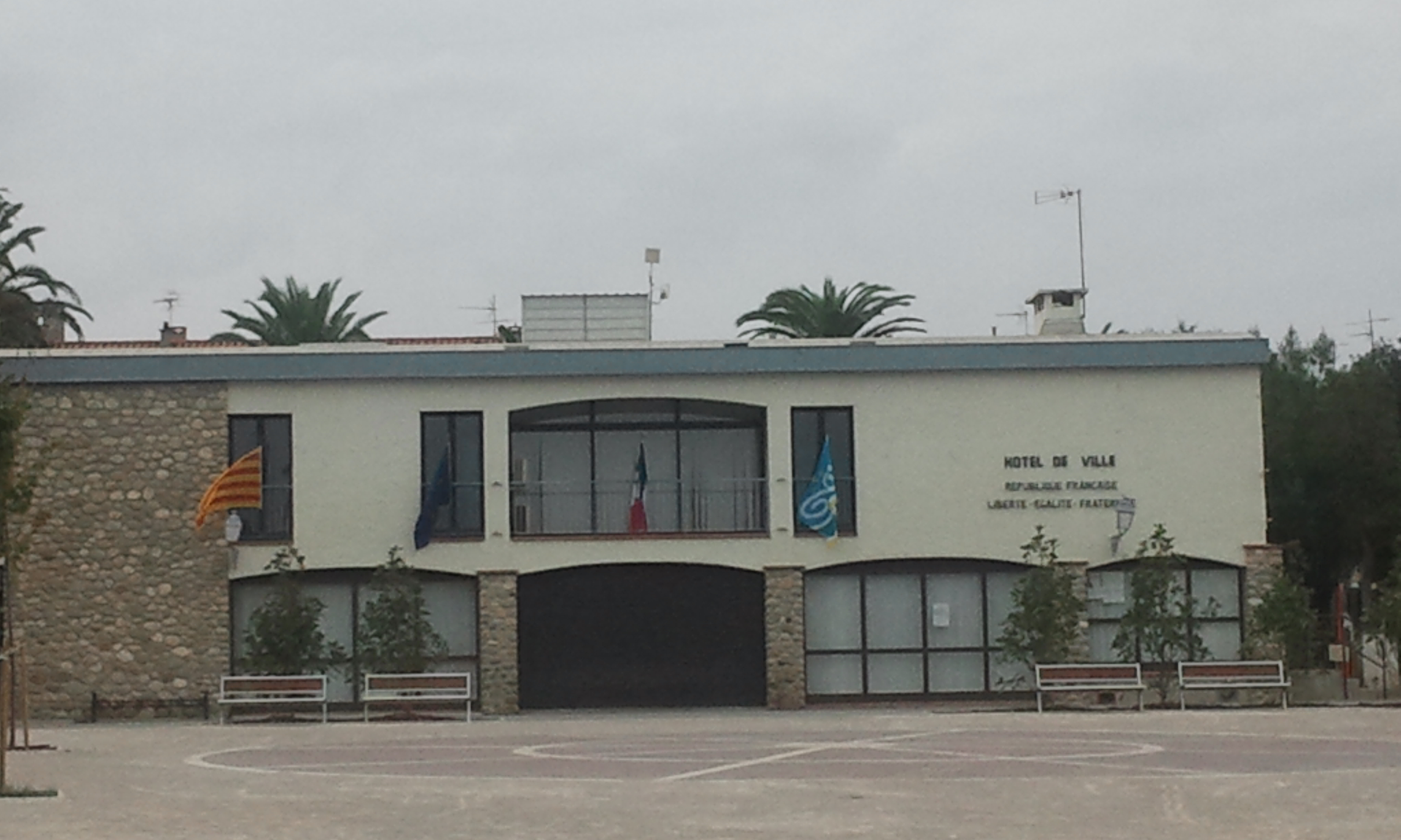 Mairie de Saint-Cyprien